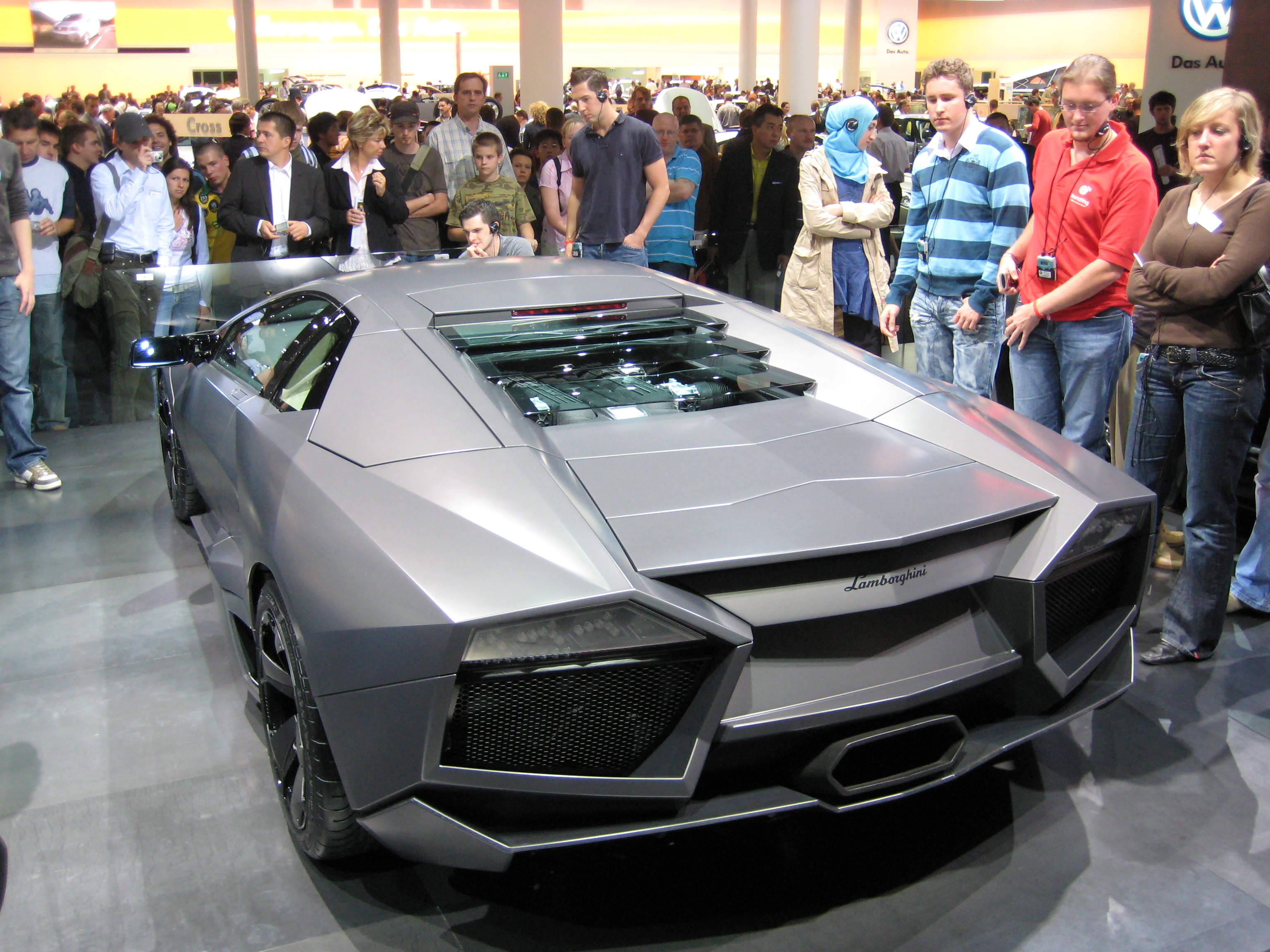 Lamborghini Reventon auf der IAA 2007 in Frankfurt